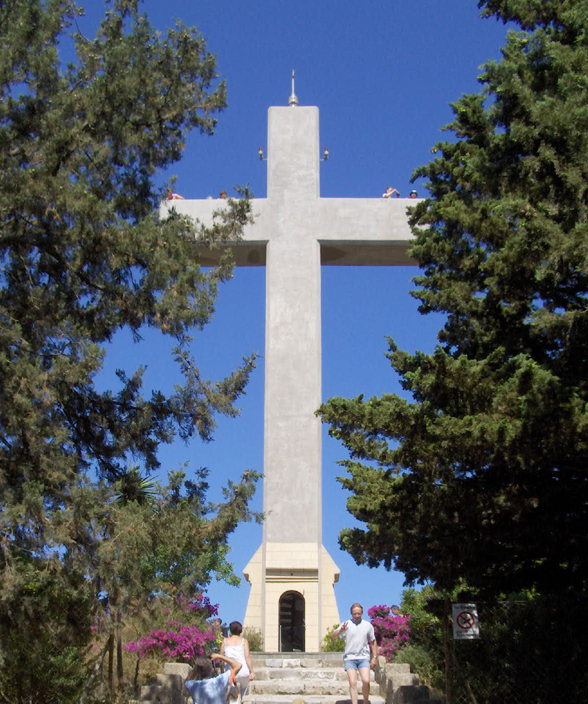 krzyż na Wzgórzu Filerimos, Rodos (Grecja)